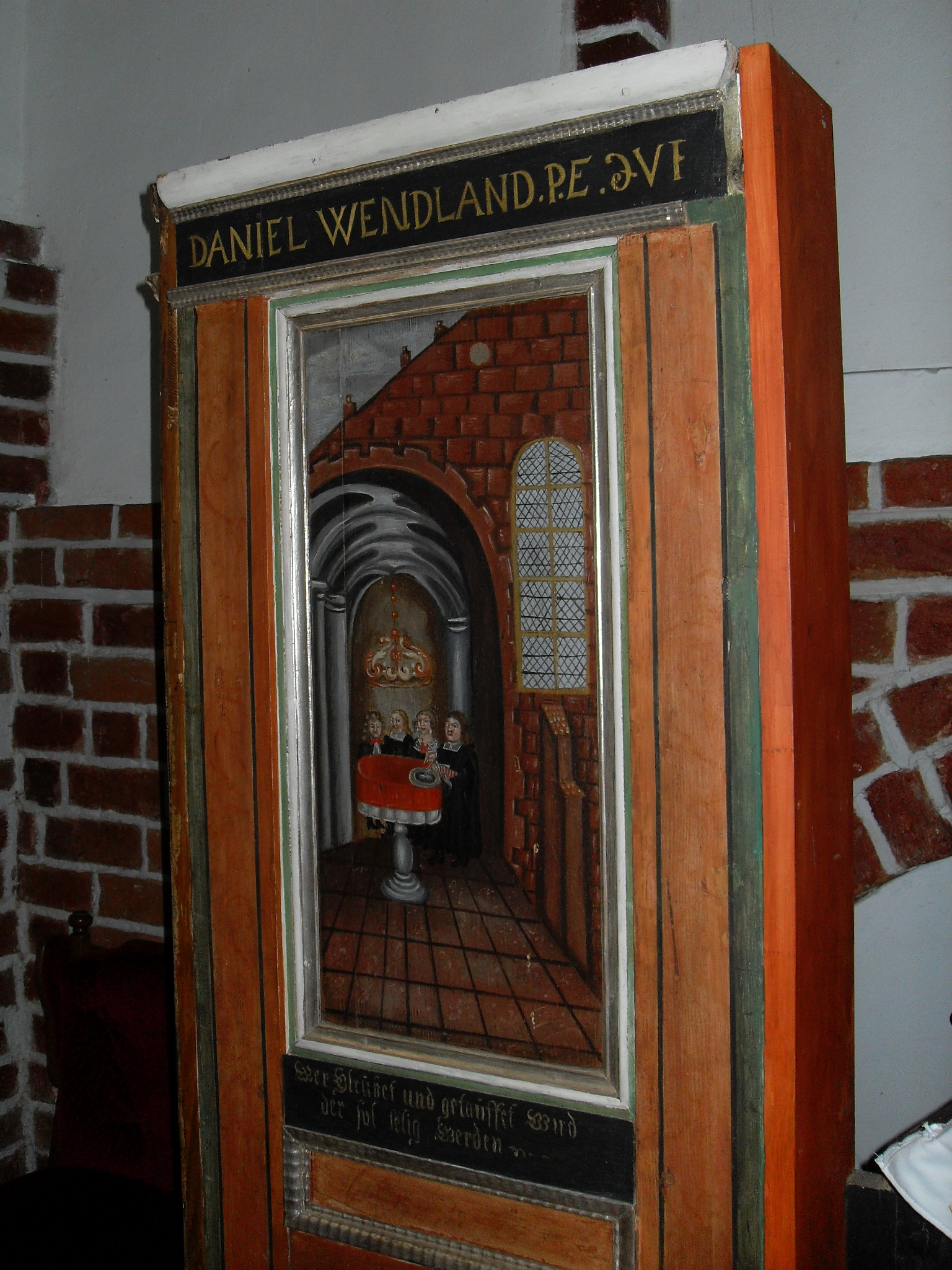 Kanzelstuhl mit Darstellungen des Steffen Woedtke und der Lucia Manteuffel